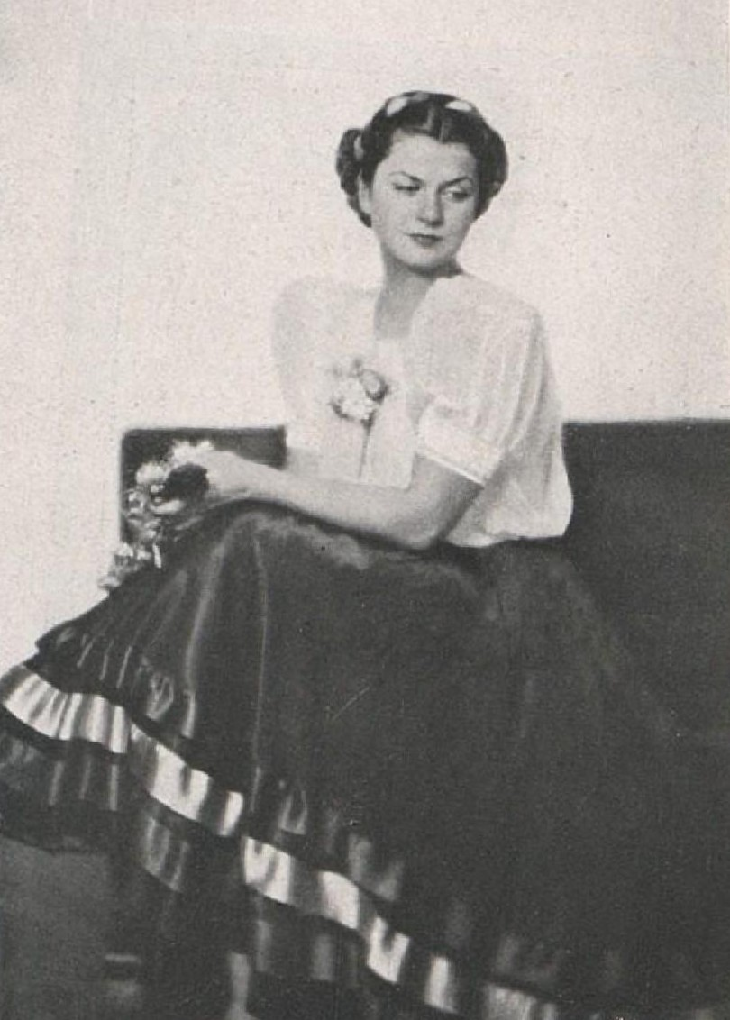 Naděžda Vladyková (1918-2015), česká herečka